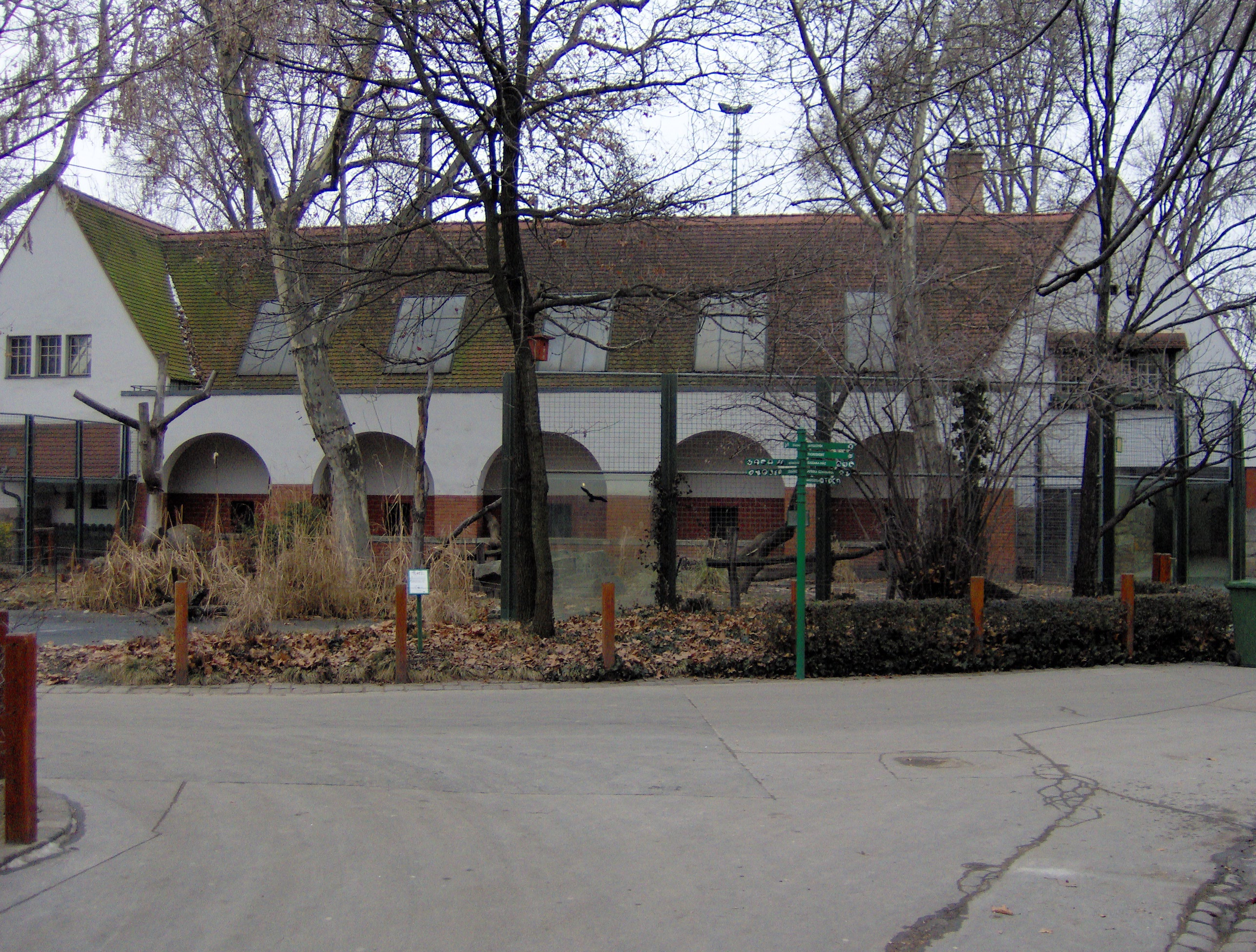 Budapesti állatkert, Afrika Ház